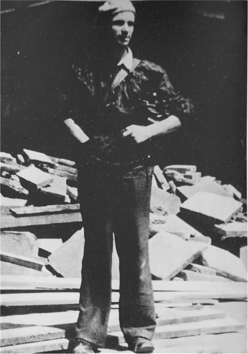 Andrzej Ancuta podczas powstania warszawskiego w 1944